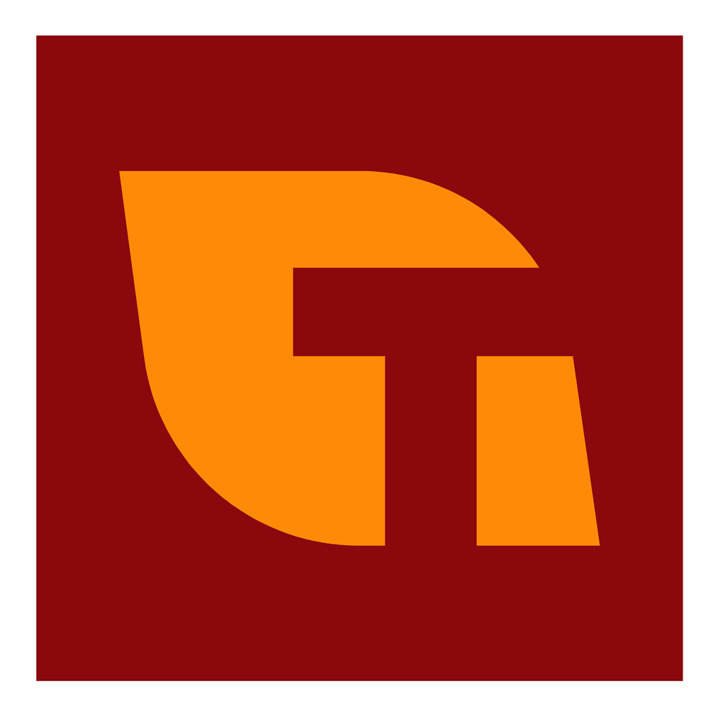 Logo de Tabacalera (1972).